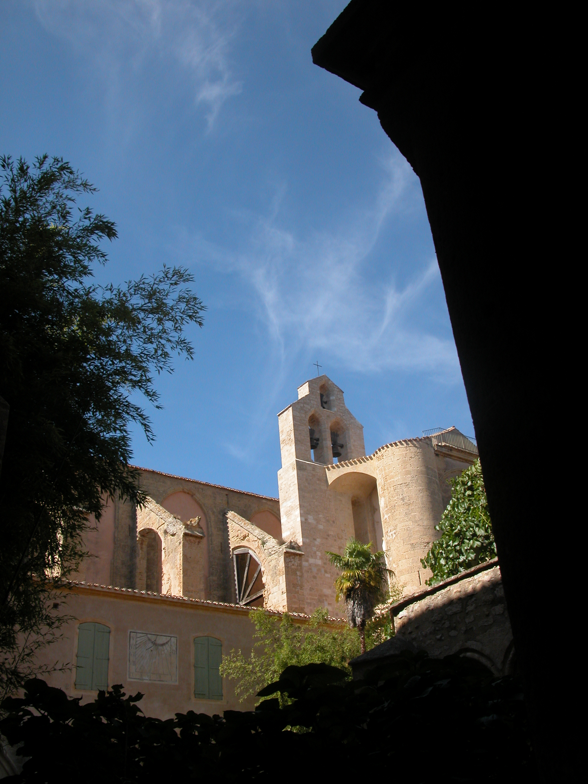 Abbaye de Valmagne - Photo personnelle.